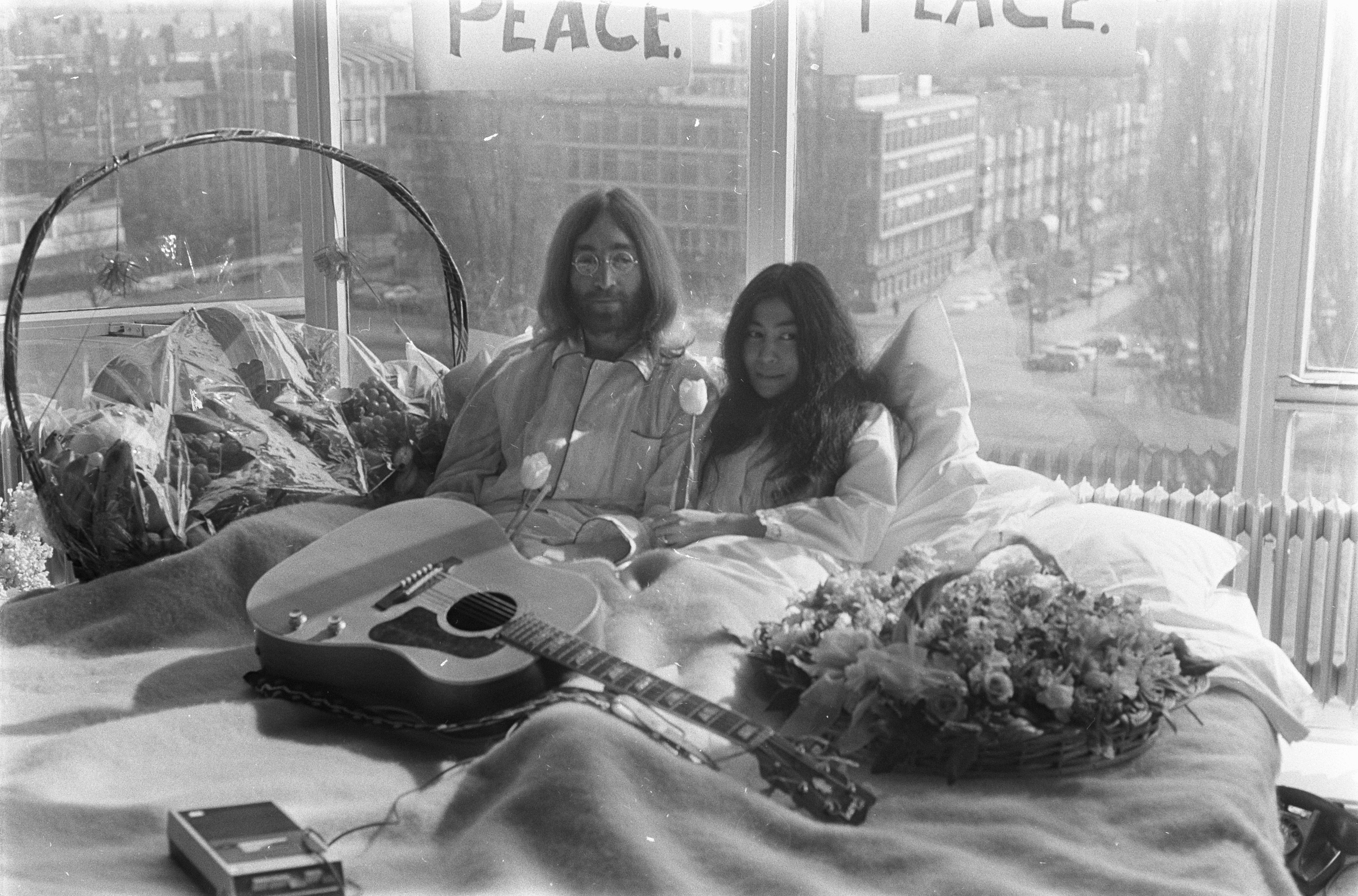 Collectie / Archief : Fotocollectie Anefo Reportage / Serie : [ onbekend ] Beschrijving : John Lennon en zijn echtgenote Yoko Ono op huwelijksreis in Amsterdam. John Lennon en Yoko Ono in bed in het Hilton Hotel Datum : 25 maart 1969 Locatie : Amsterdam, Noord-Holland Trefwoorden : hotels, huwelijksreizen, musici, muziek, zangers Persoonsnaam : Lennon, John, Ono, Yoko Fotograaf : Koch, Eric / Anefo Auteursrechthebbende : Nationaal Archief Materiaalsoort : Negatief (zwart/wit) Nummer archiefinventaris : bekijk toegang 2.24.01.05 Bestanddeelnummer : 922-2309